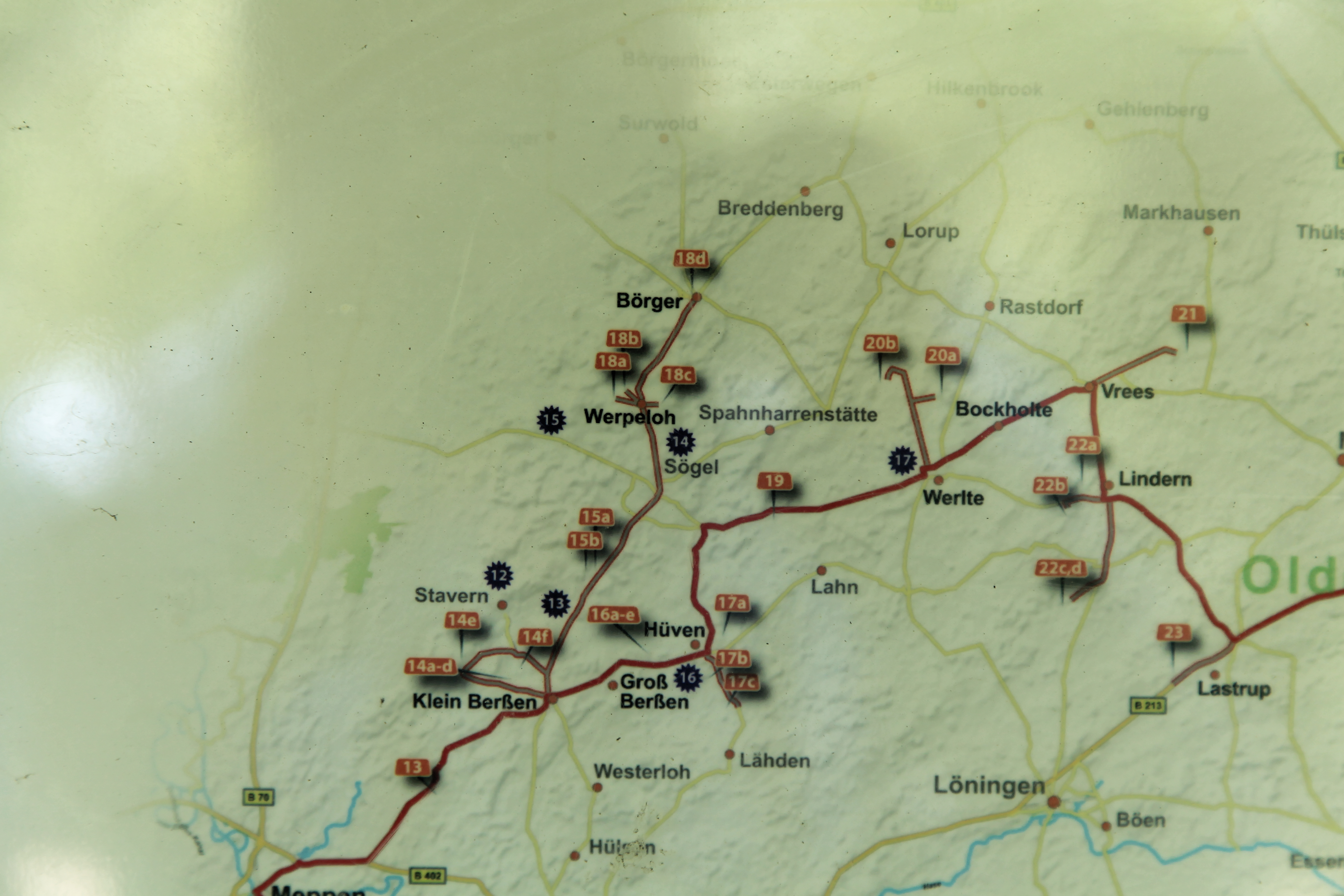 Großsteingräber auf der Buschhöhe, Zum Windberg in Werpeloh